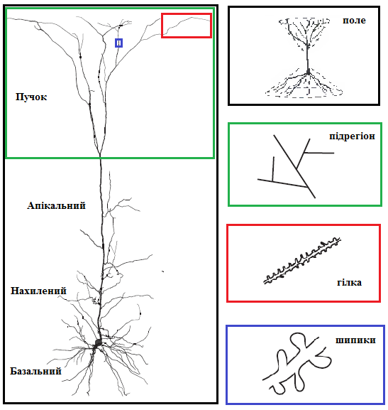 Пірамідальний нейрон L5 кори